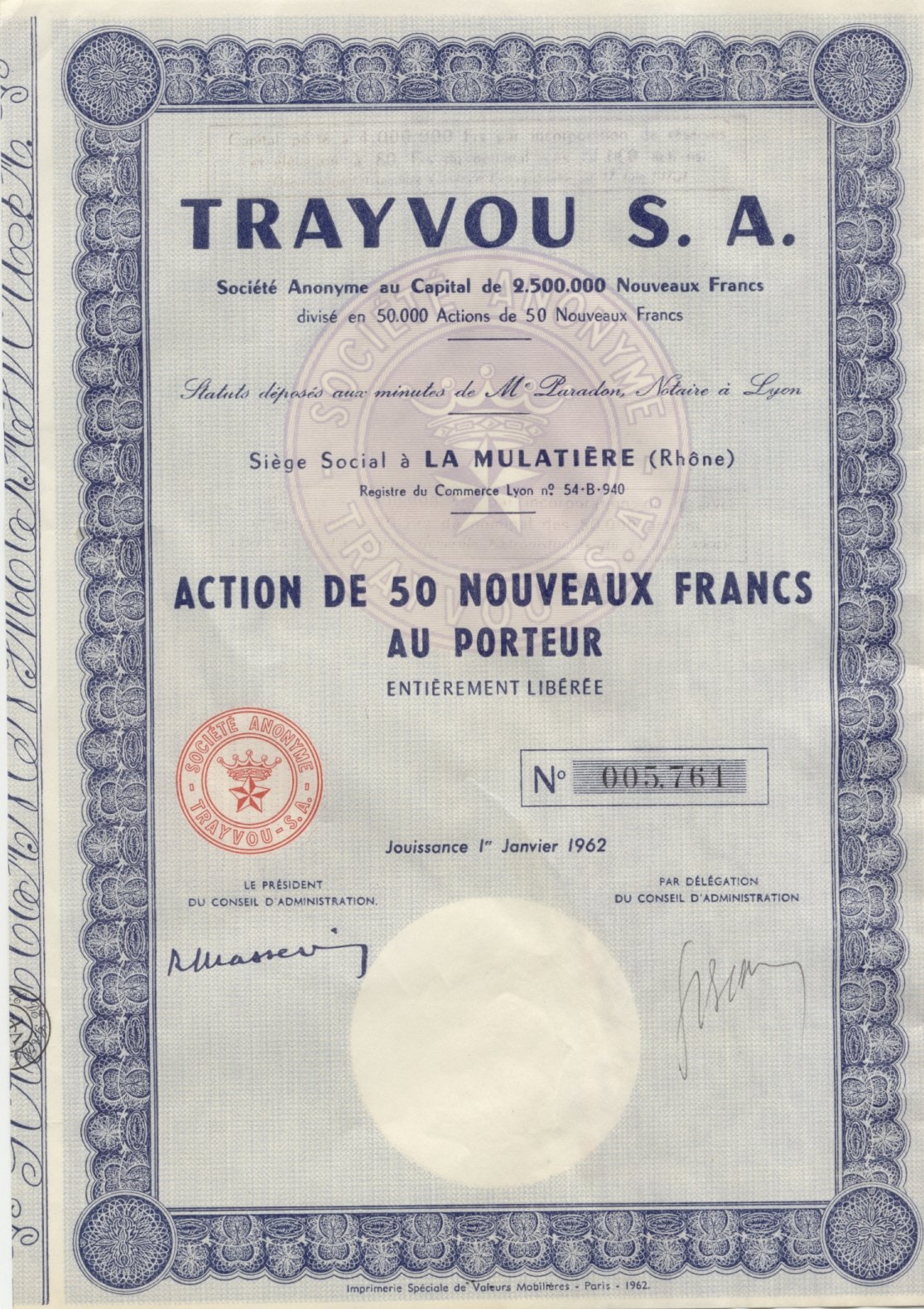 action de la société lyonnaise Trayvou